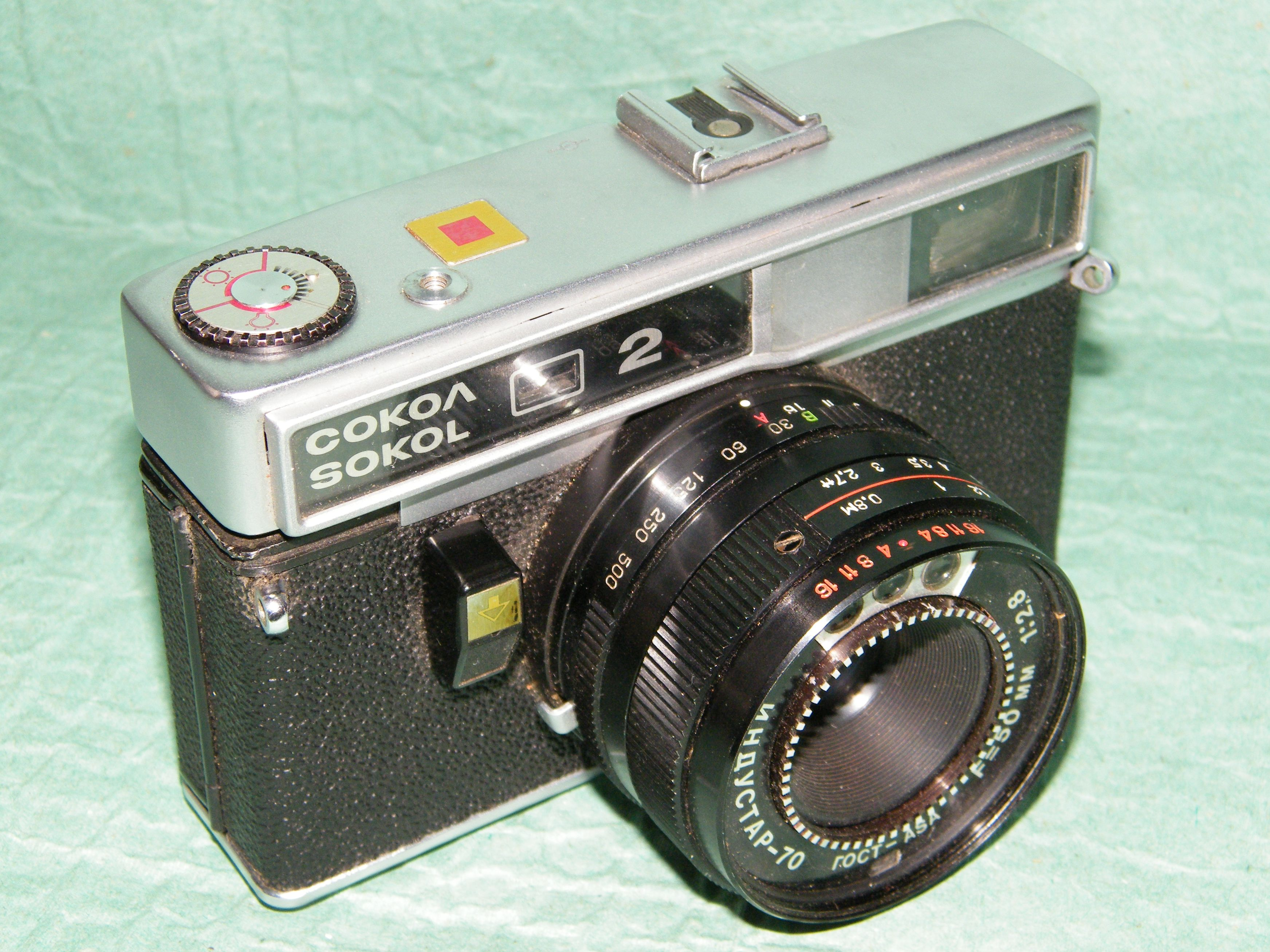 Фотоаппарат "Сокол-2" производства ЛОМО